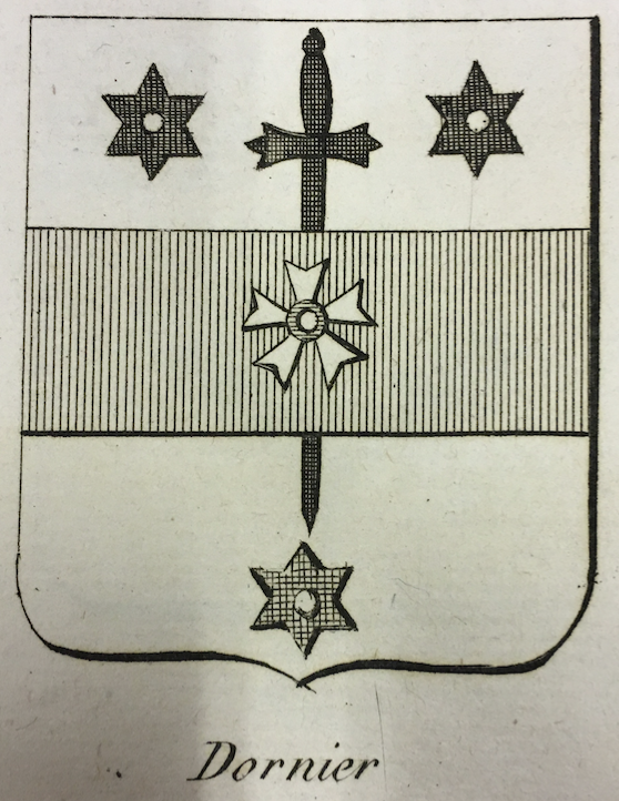 Armoiries de François-Gabriel Dornier (1772-1844) en 1812 : D'argent à l'épée en pal la pointe basse accompagnée de trois molettes le tout de sable ; fasce de gueules du tiers de l'écu au signe des chevaliers. Il était alors chevalier de l'Empire (il devint baron en 1830).